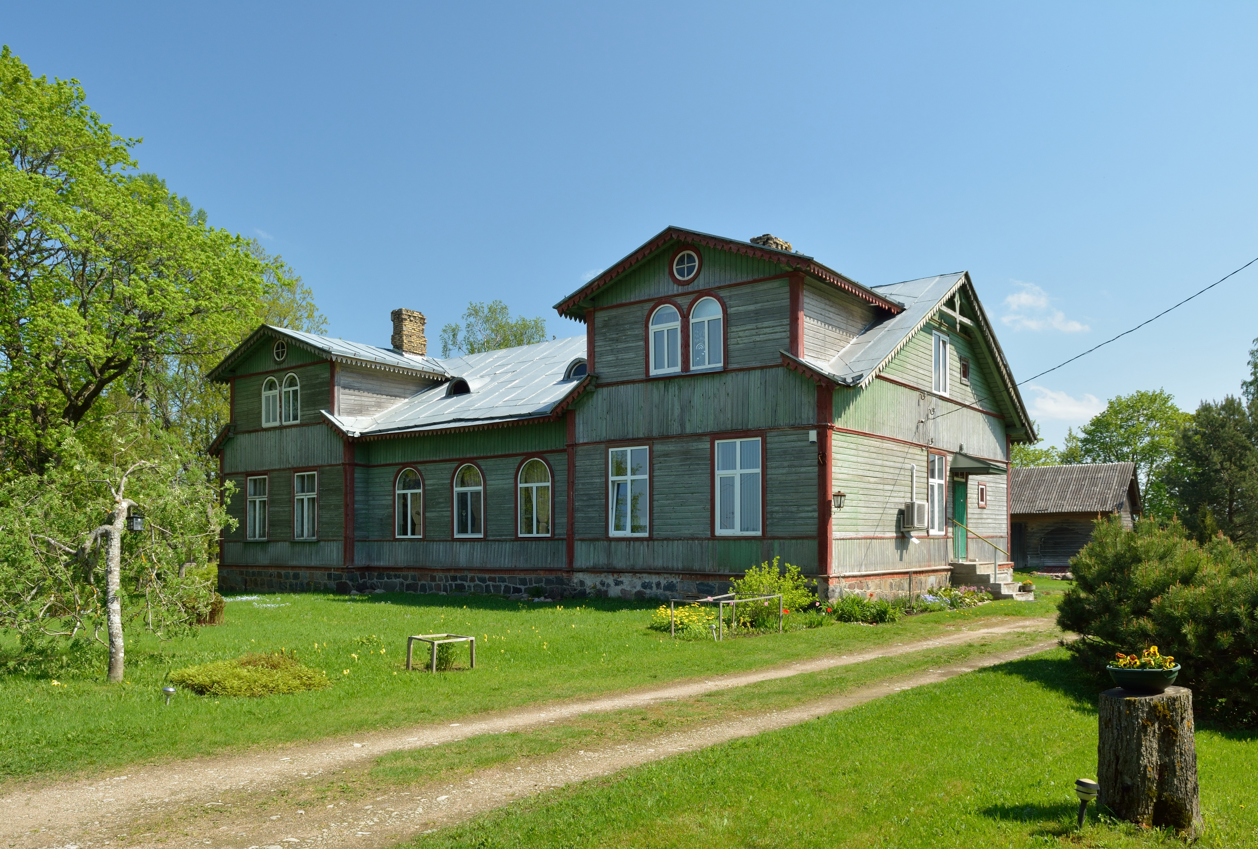 Vidriku talu eluhoone, Vägeva küla